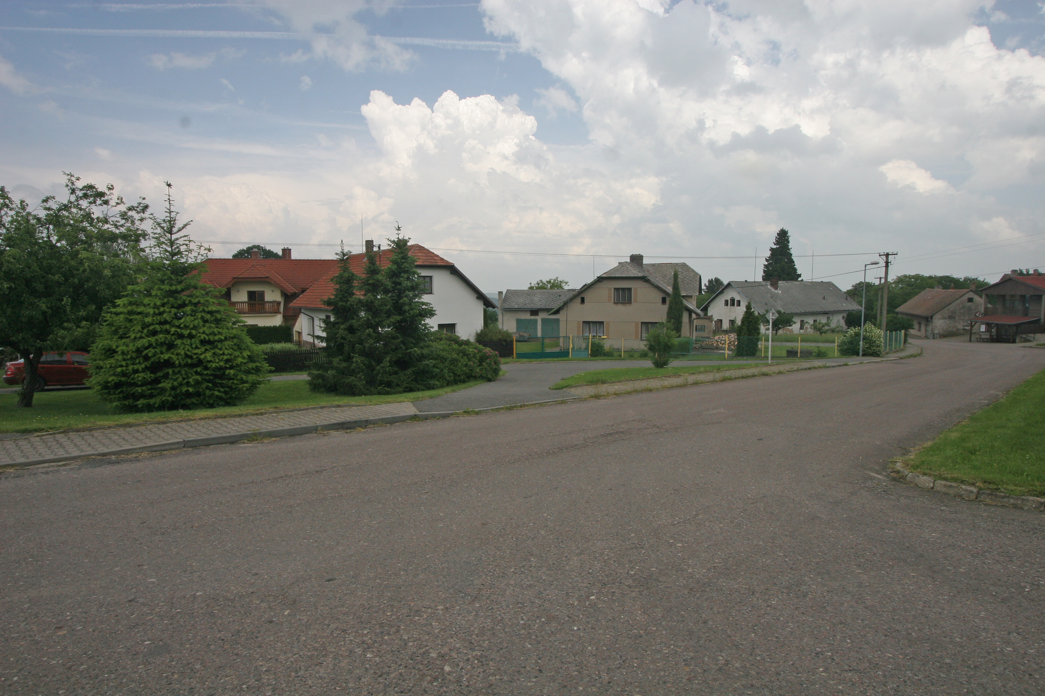 Liboměřice náves